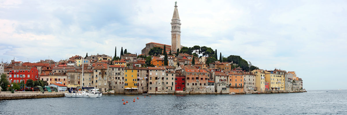 Panorama di Rovigno/Rovinj - Croazia